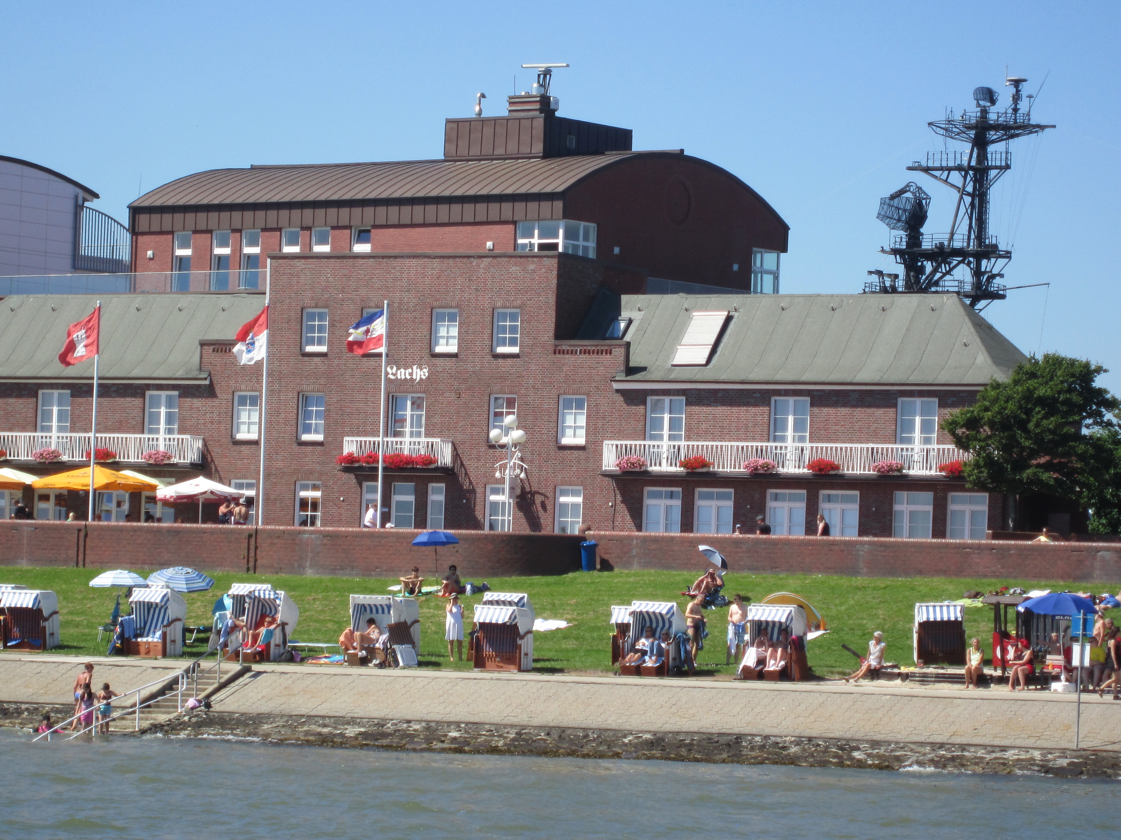 Südstrand von Wilhelmshaven